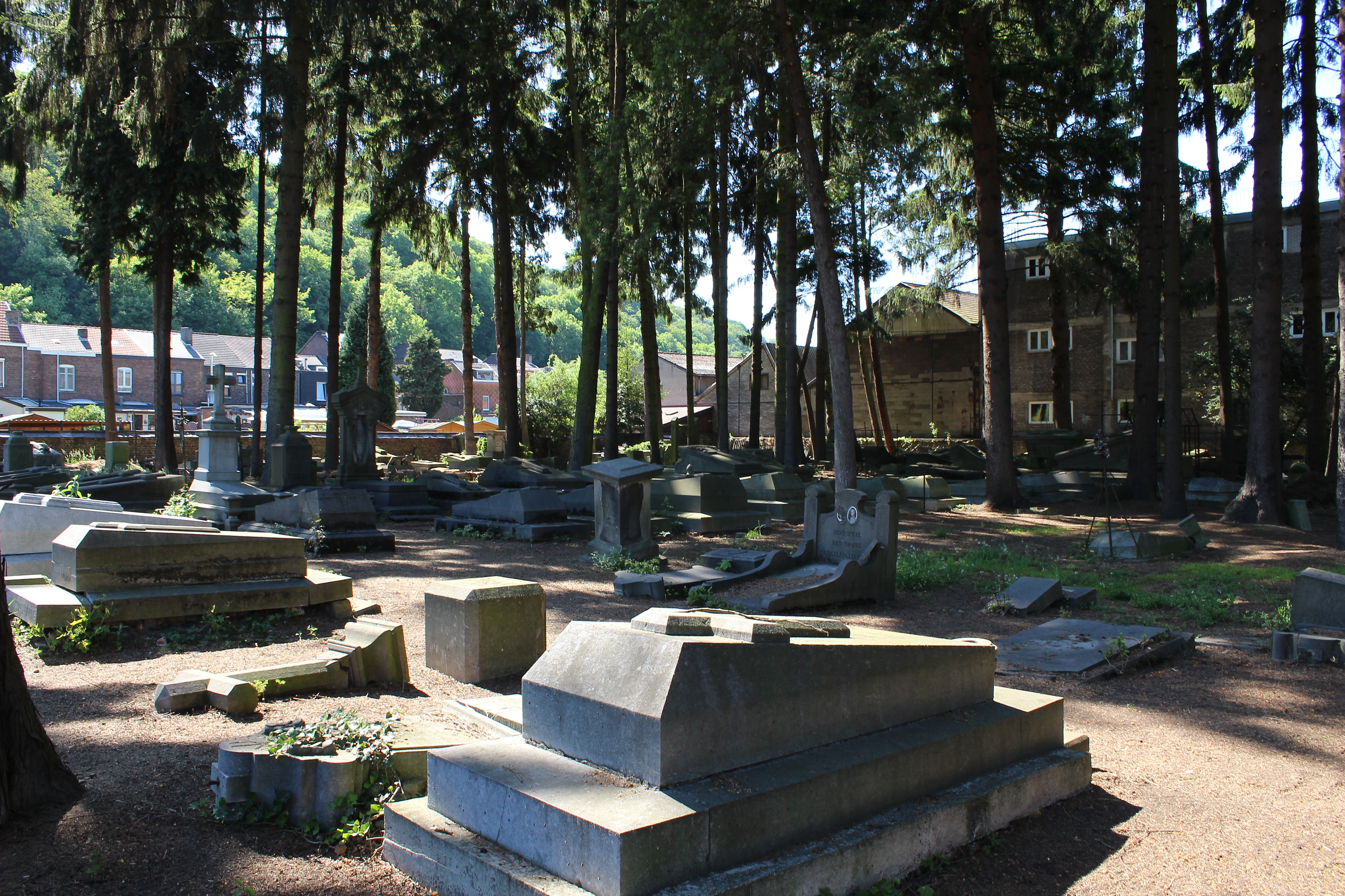 Diguette Vue d'ensemble - Angleur